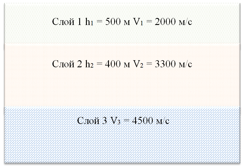 Модель распределения упругих свойств в геологической среде